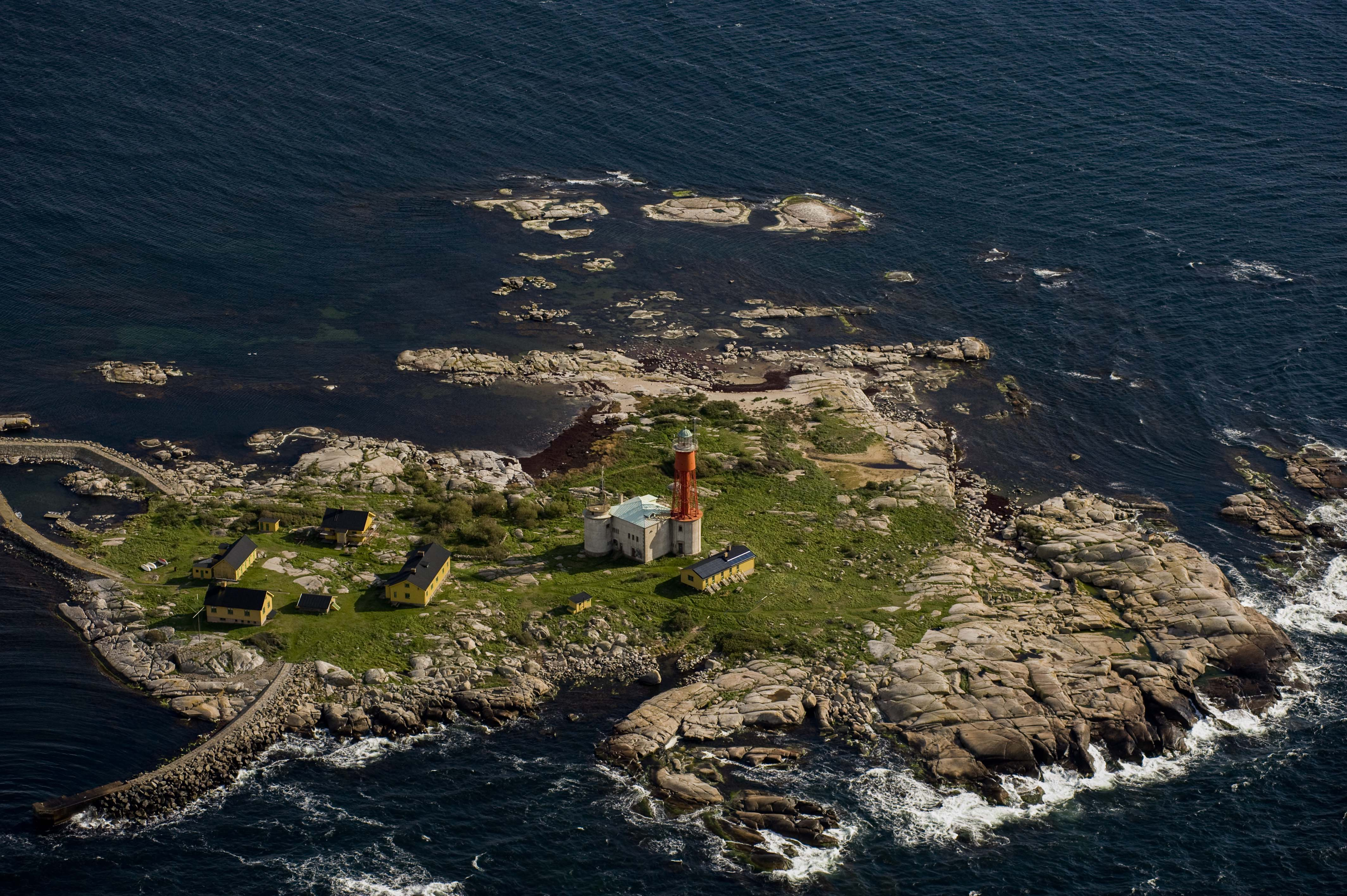 Utklippans fyrplats från luften